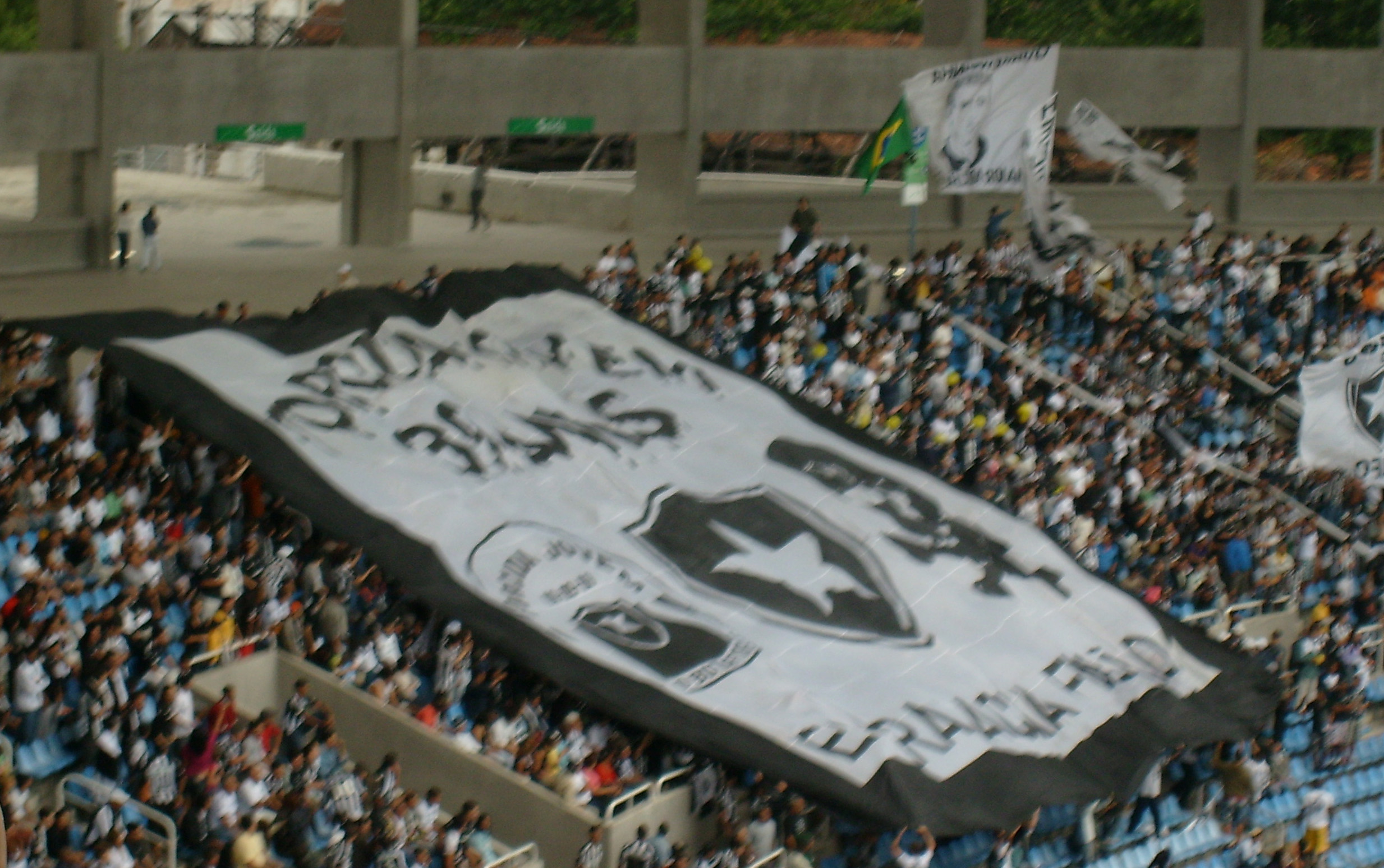 Bandeirão da Torcida Jovem do Botafogo (TJB) no Engenhão.